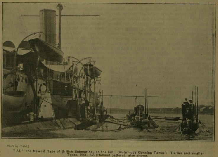 1904 illustration